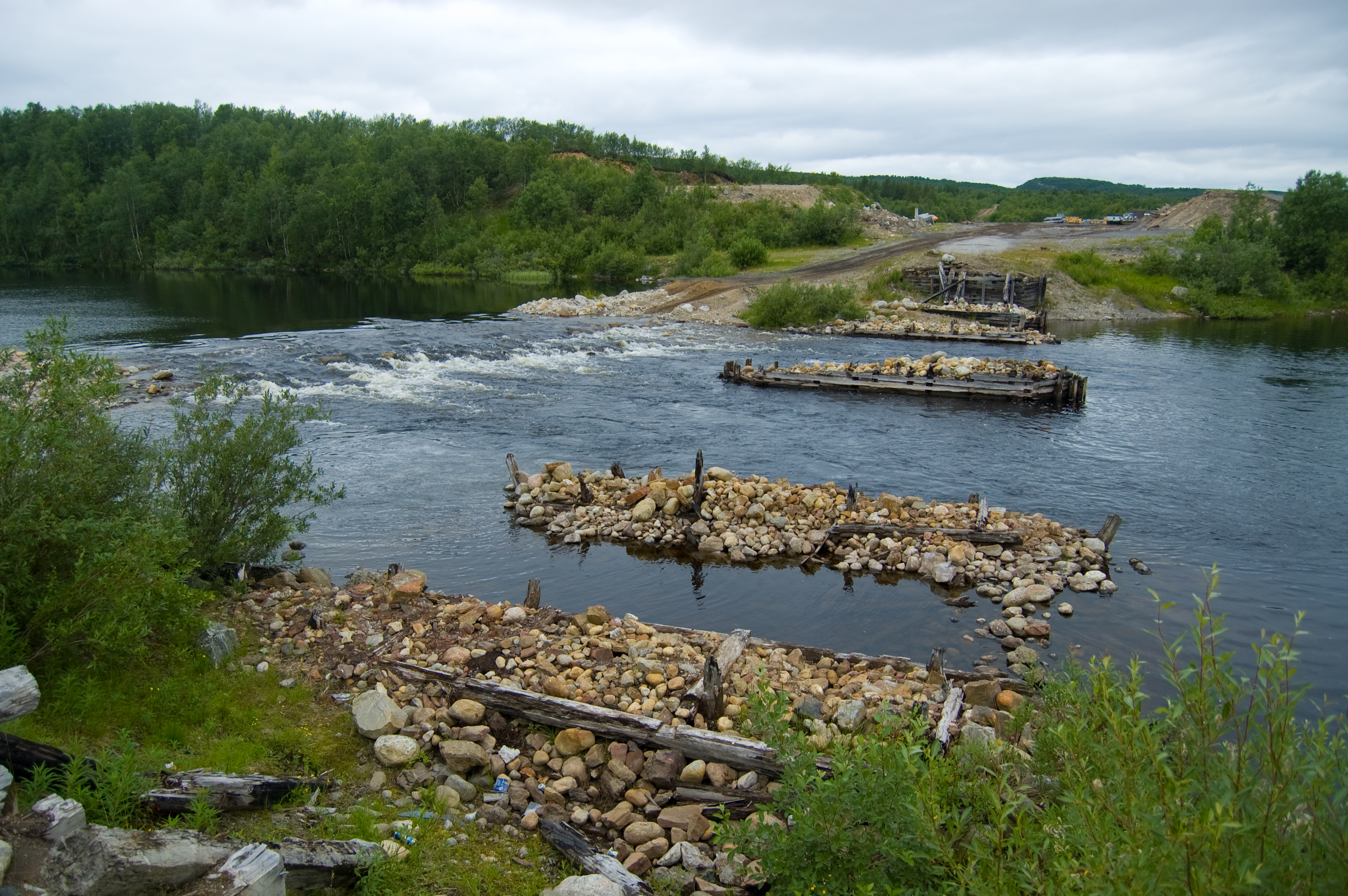 Разрушенный мост